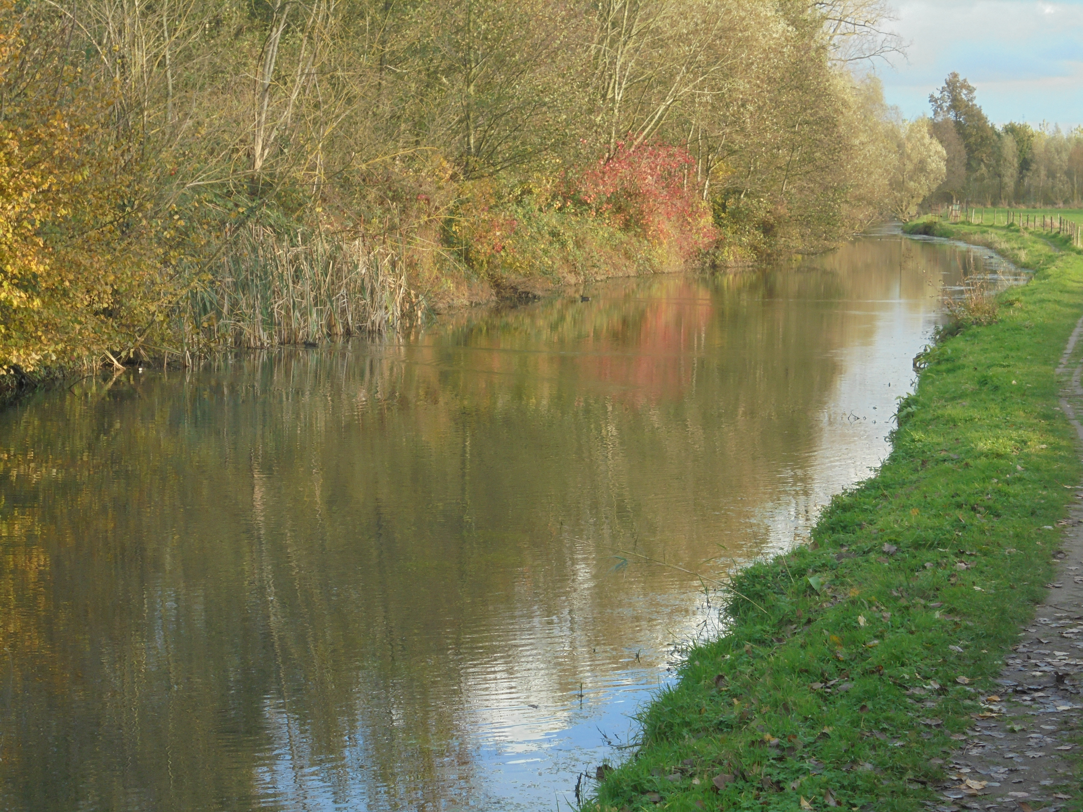 De Zwalmrivier - Zwalm - Oost-Vlaanderen - België